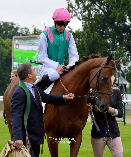 New bay